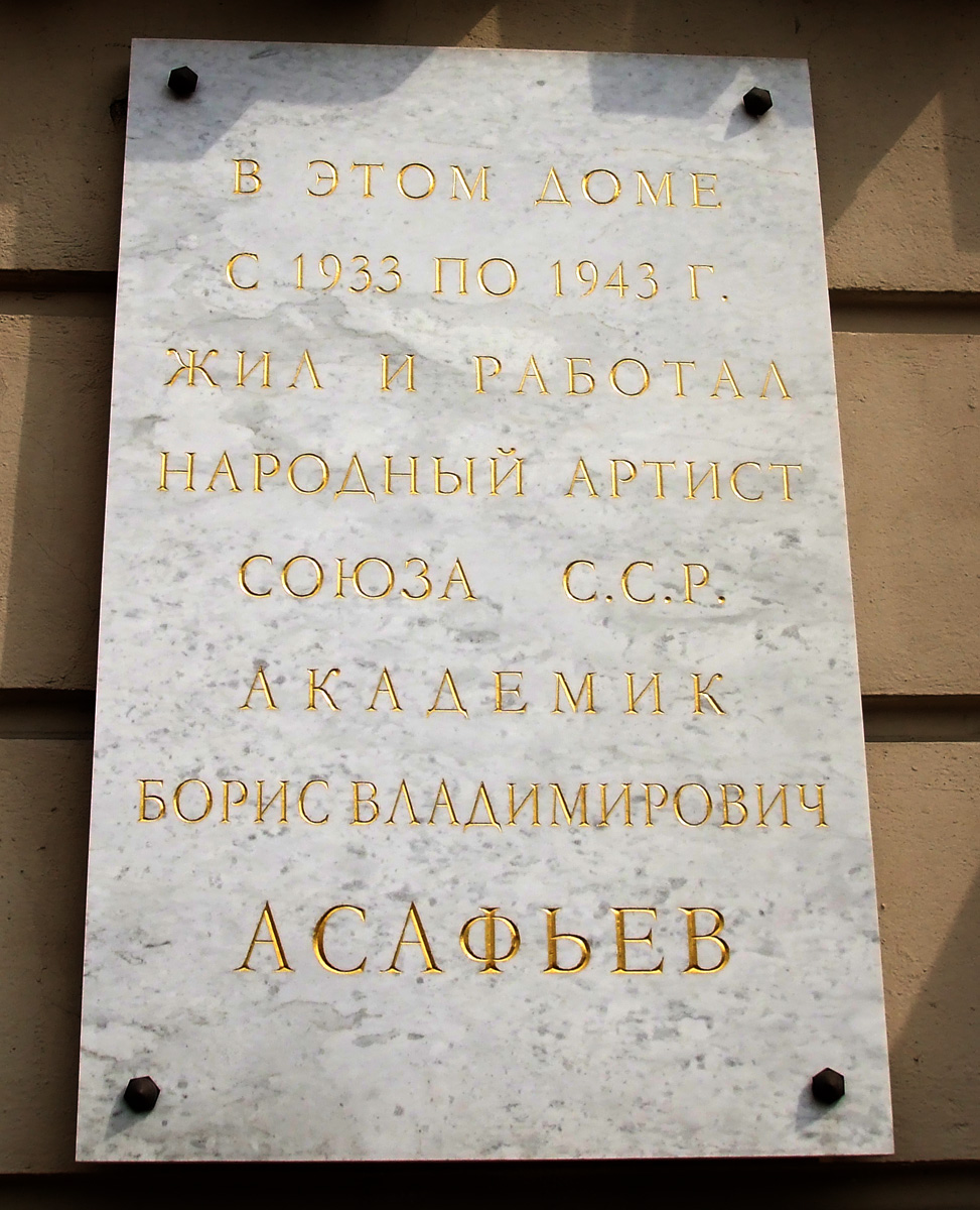 Площадь Труда, Санкт-Петербург